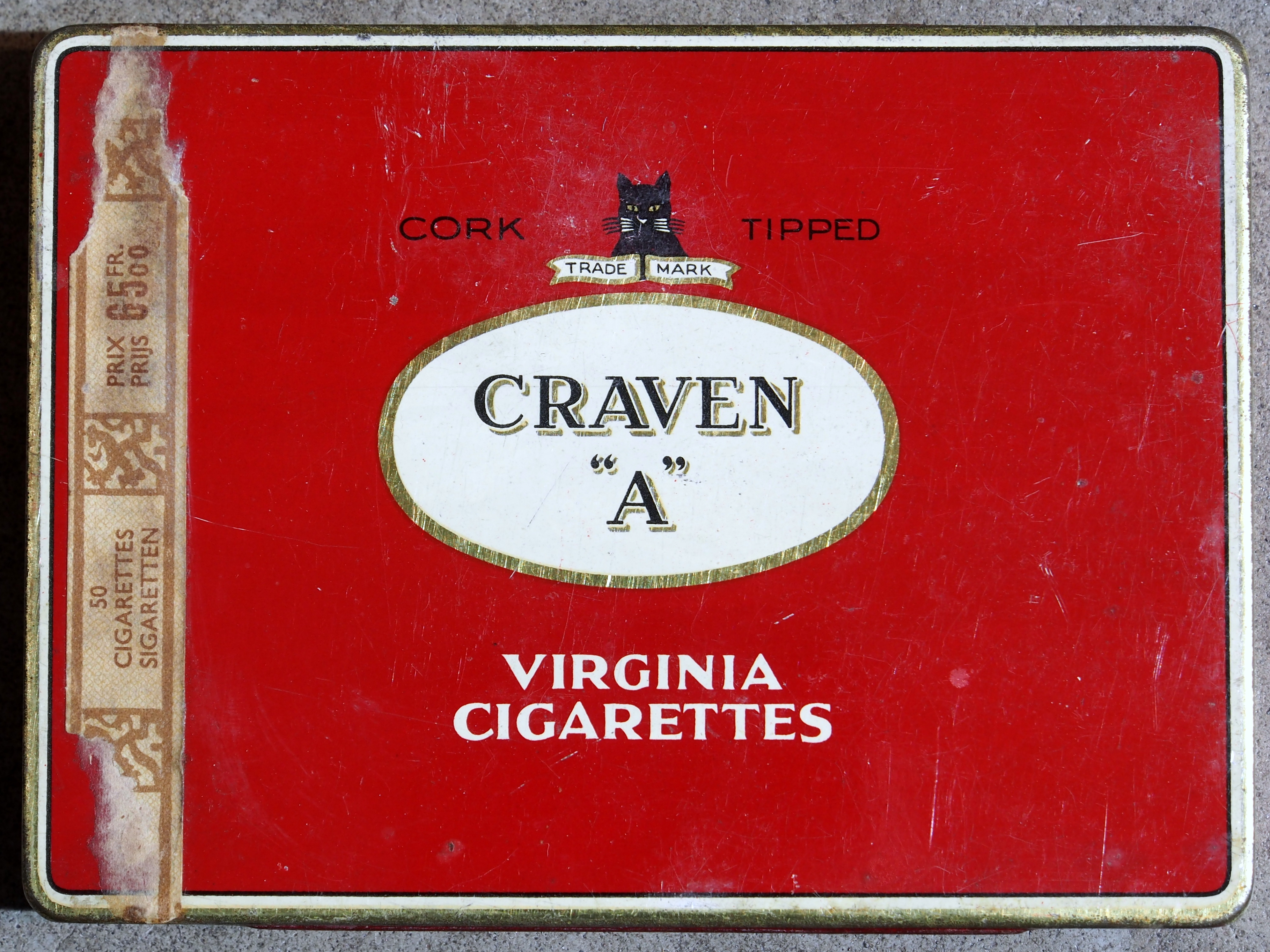 Craven A, Virginia Cigarettes